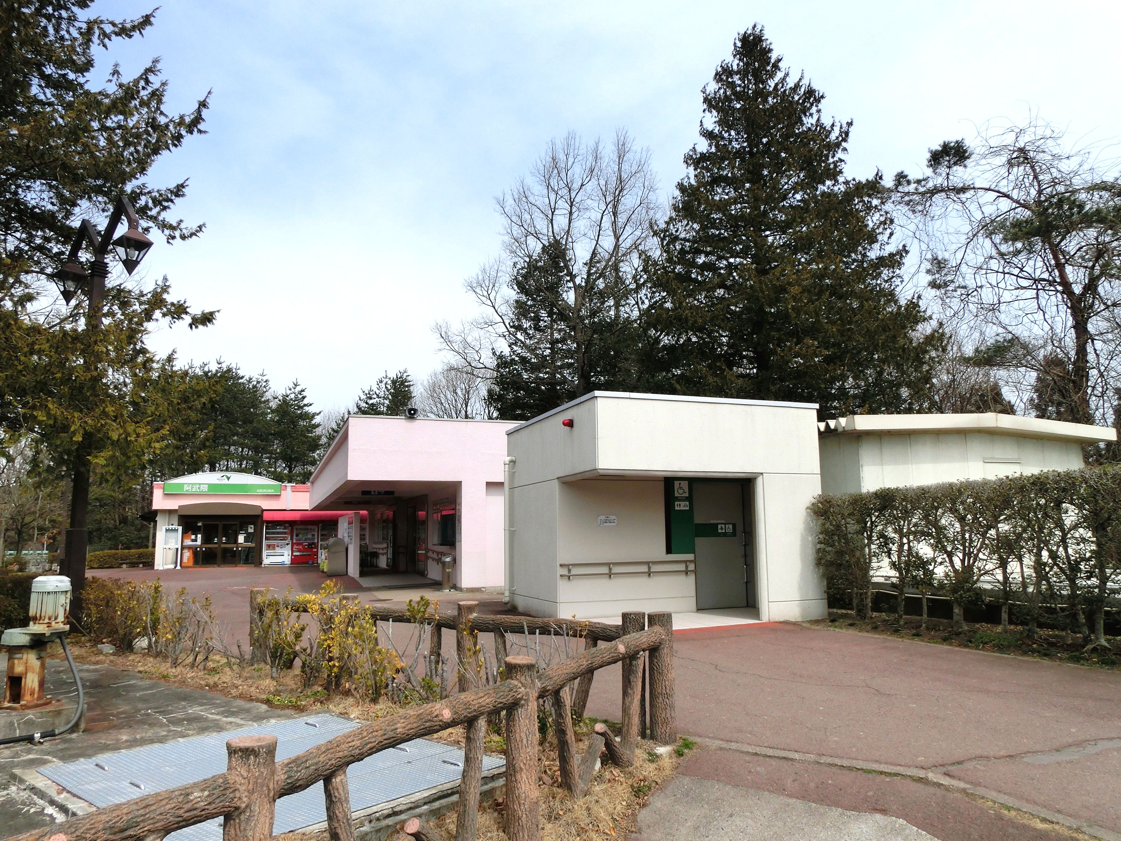 東北自動車道 阿武隈パーキングエリア（上り線）